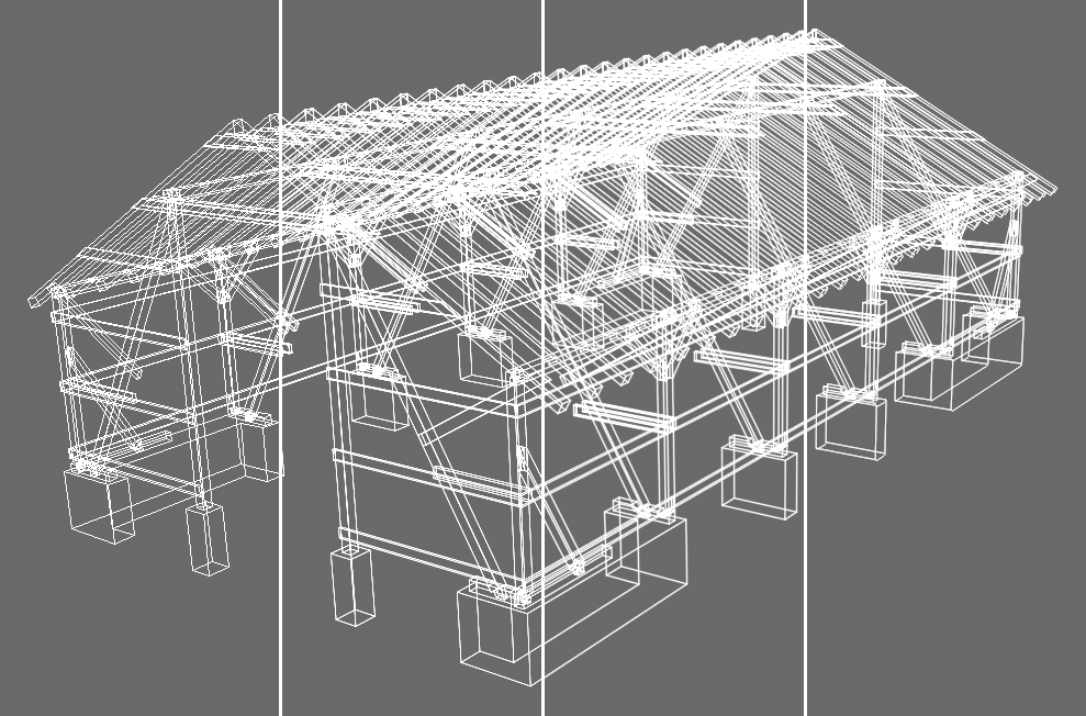 Verschiedene Methoden des Antialiasing von Linien. Von links nach rechts: Kein Antialiasing, Gupta-Sproull-Algorithmus mit Kegelfilter, ungewichtete Flächenabtastung, Wu-Antialiasing